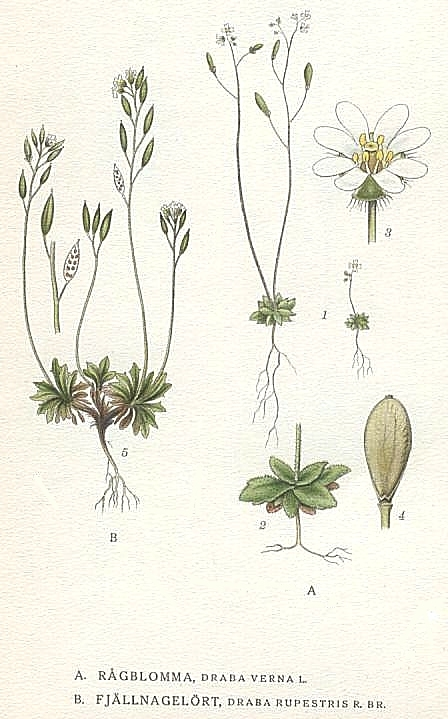 A. Erophila verna (L.) Chevall., syn. Draba verna L. B. Draba norvegica Gunn., syn. Draba rupestris R.Br. Original Description A. Rågblomma, Draba verna L. B. Fjällnagelört, Draba rupestris R.Br